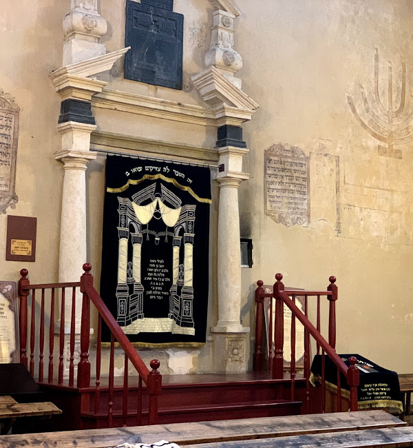 Aron ha-kodeš (schránka na Tóru, nebo též svatostánek) v Izákově synagose, Krakov, Polsko.